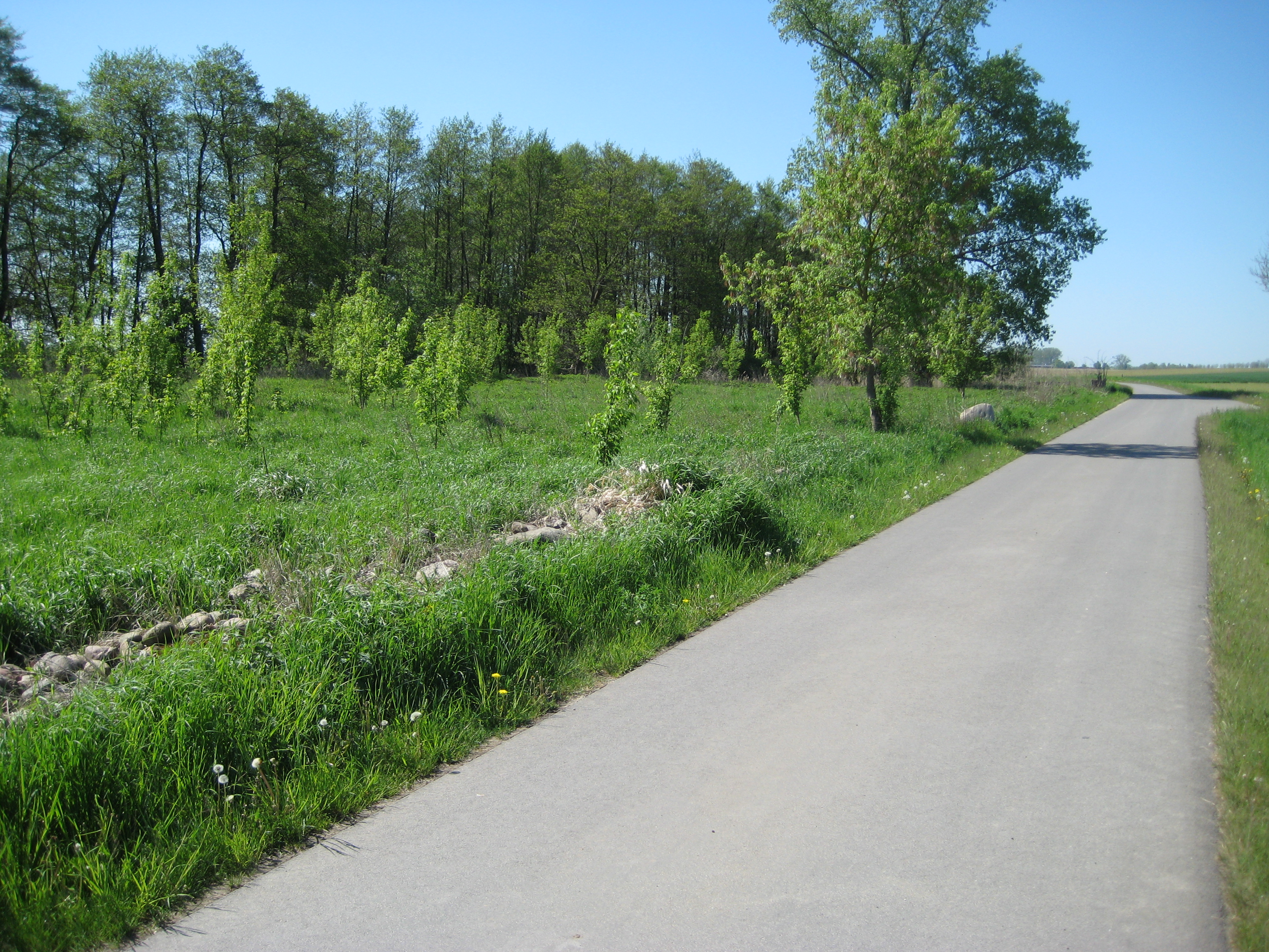 Durch Schönwerder führt der Fernradwanderweg